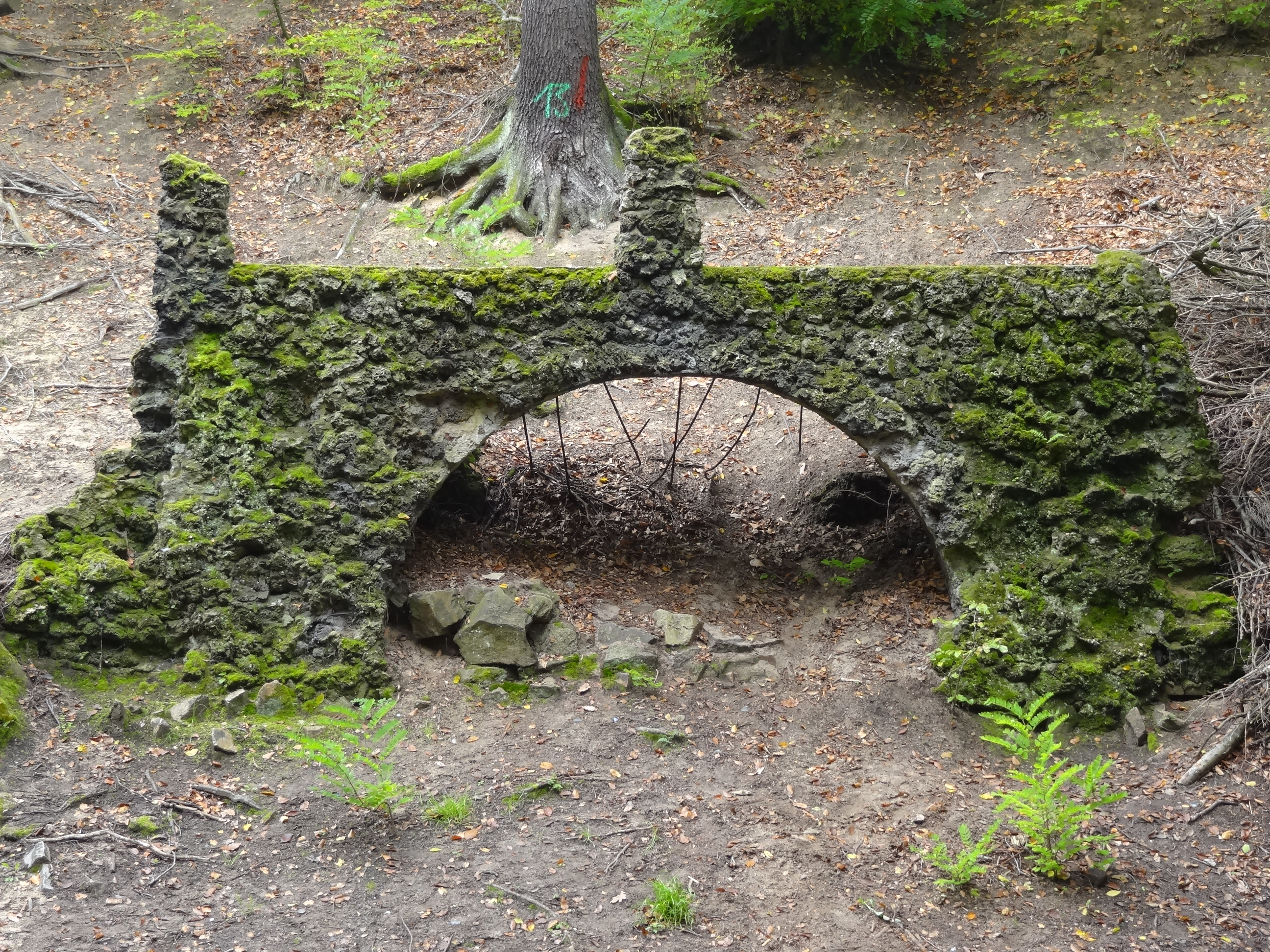 Lößnitzgrund